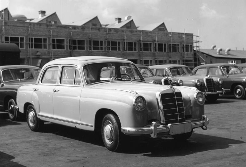 Daimler-Benz A.G. Werk Sindelfingen Typ 190